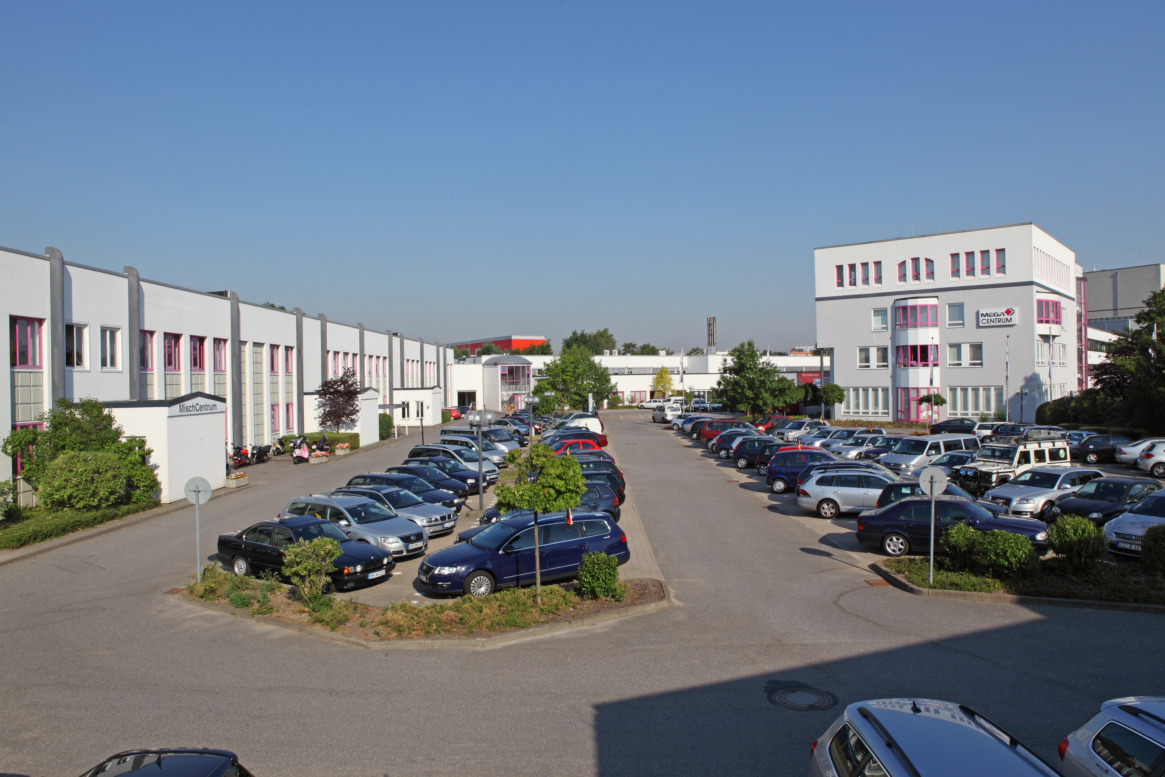 Unternehmenszentrale der MEGA eG in Hamburg-Eidelstedt mit Lager- und Verwaltungsgebäuden